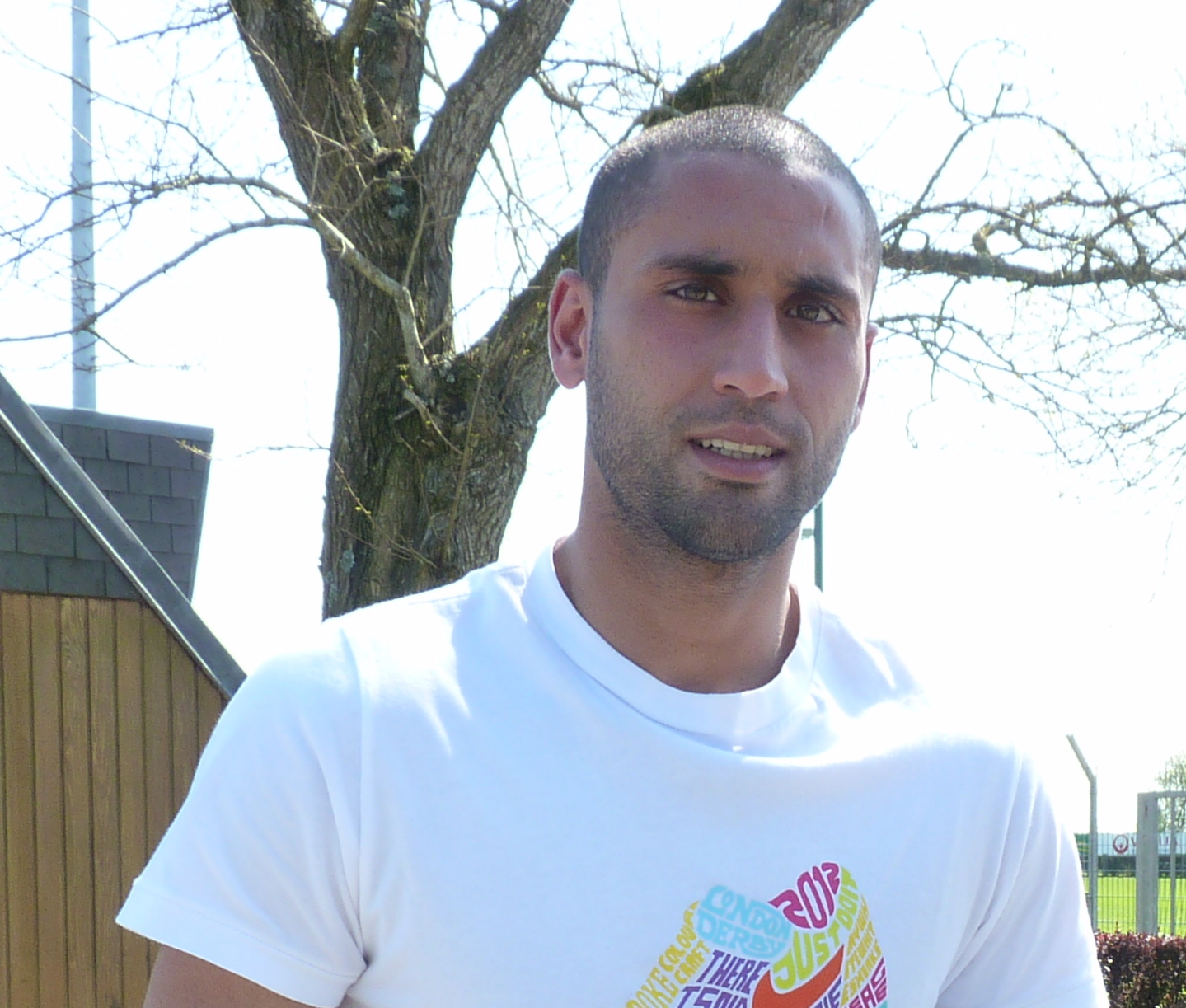 Ahmed Kantari à la sortie de l'entrainement du 20 avril 2010